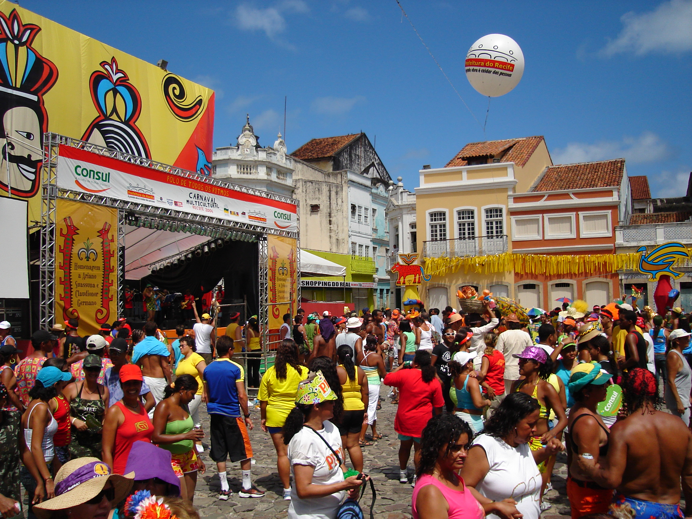 Terça-feira de Carnival at Pátio de São Pedro square in Recife, Brazil.